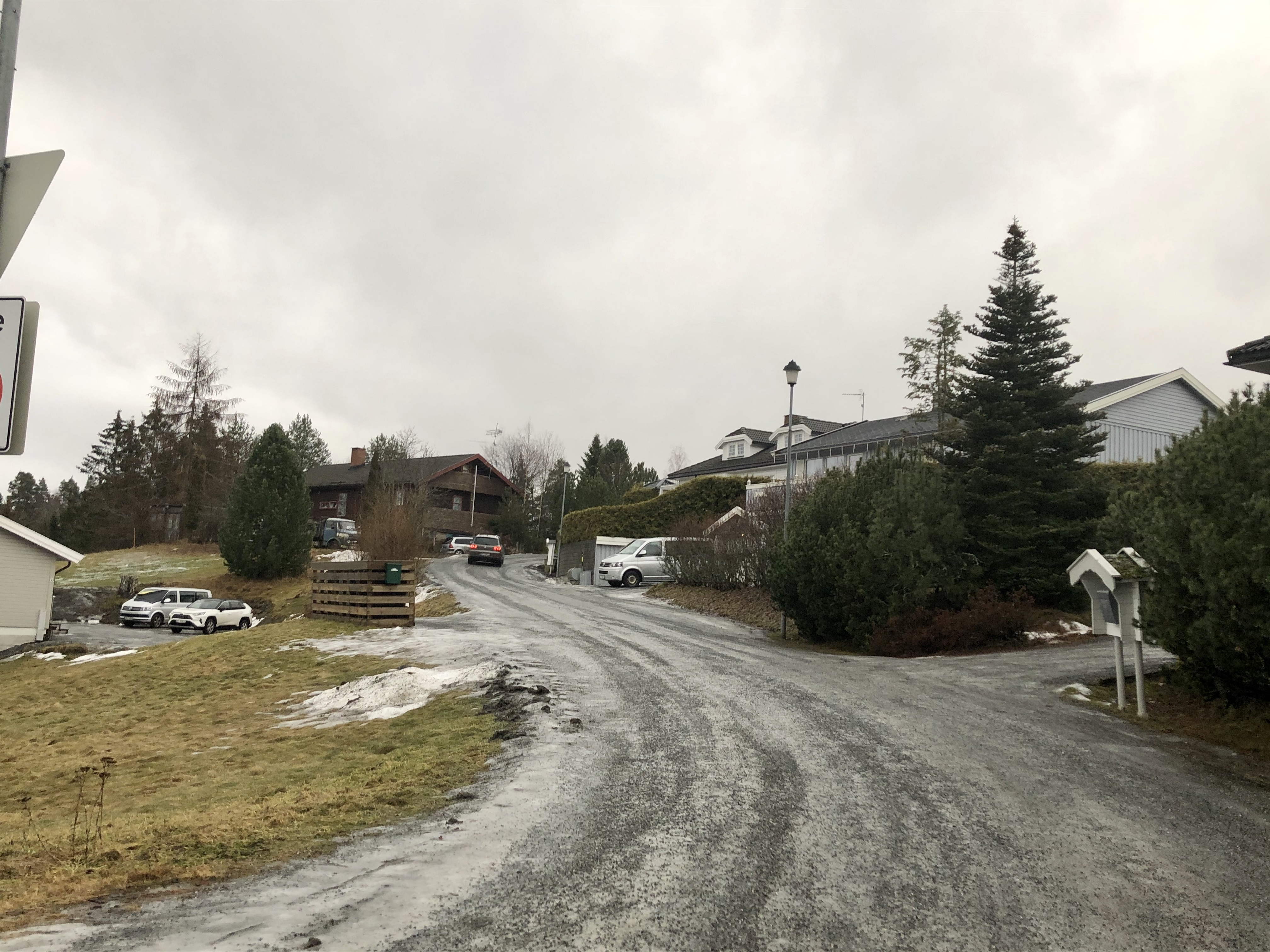 Ramsrudveien, Ringerike